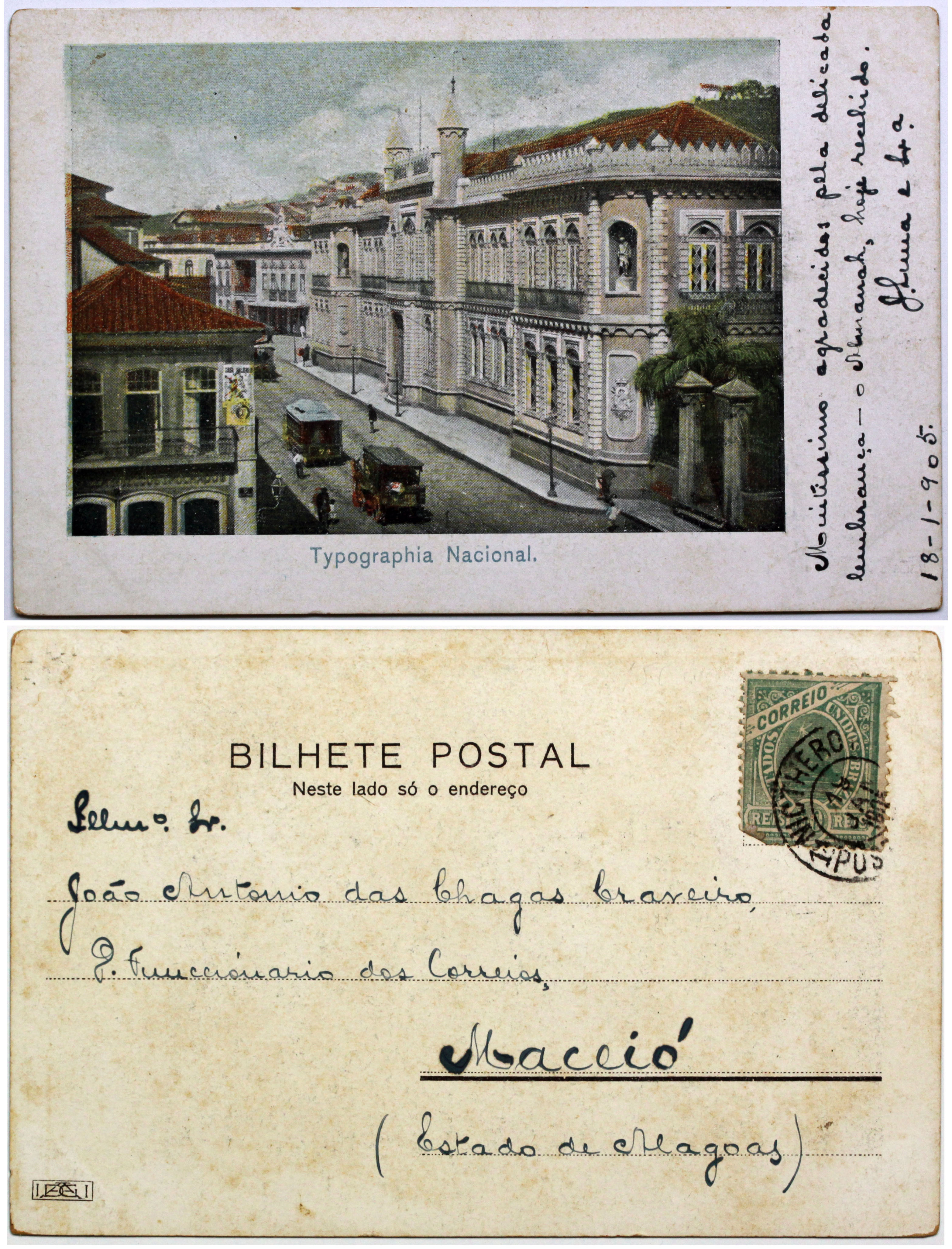 Edifício da Imprensa Nacional na Rua da Guarda Velha, atual Av. Treze de Maio.